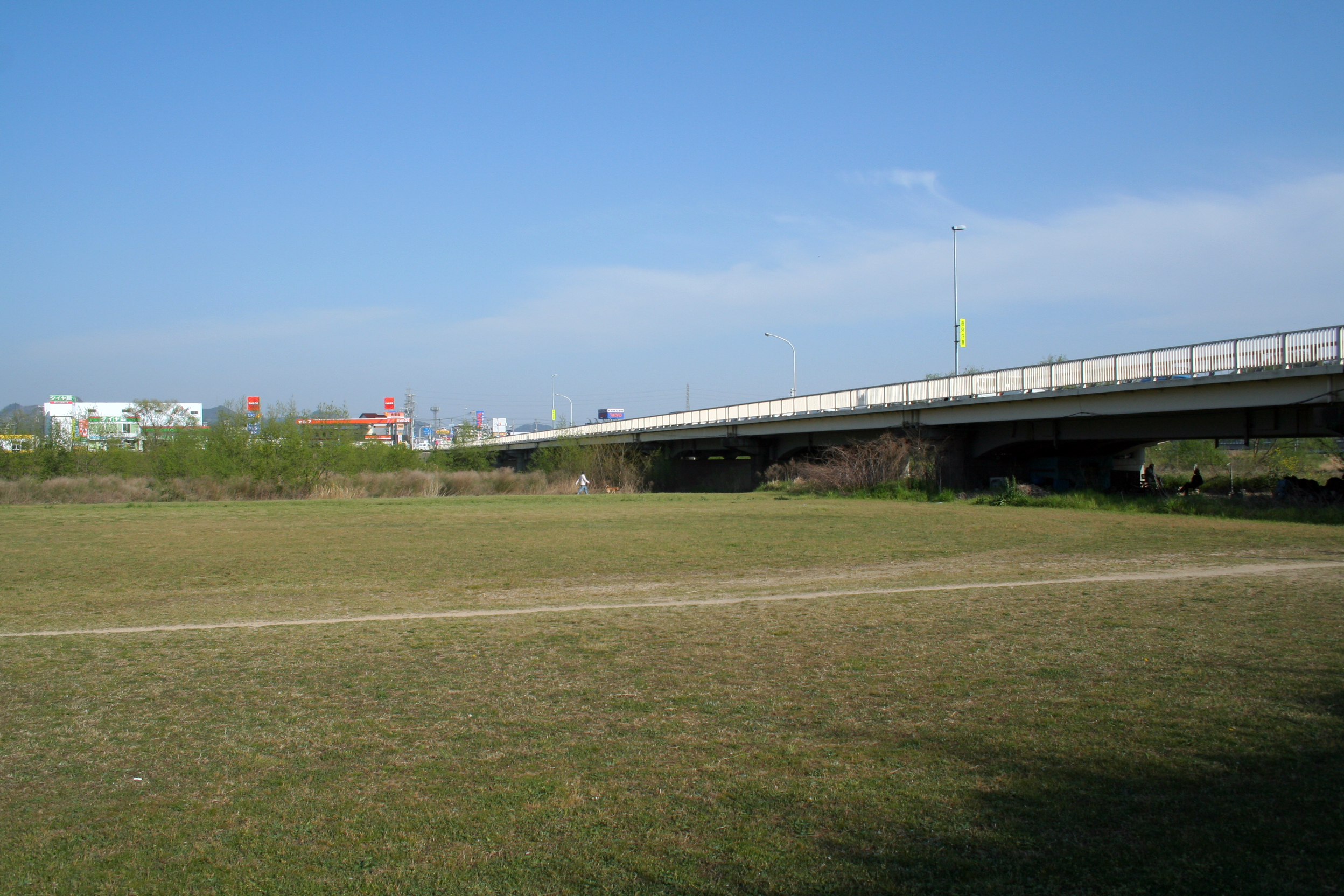 兵庫県南西部を流れる市川。 姫路市市川橋北側西岸にて撮影。 市川に架かる市川橋。橋は国道2号線の道路になっている。